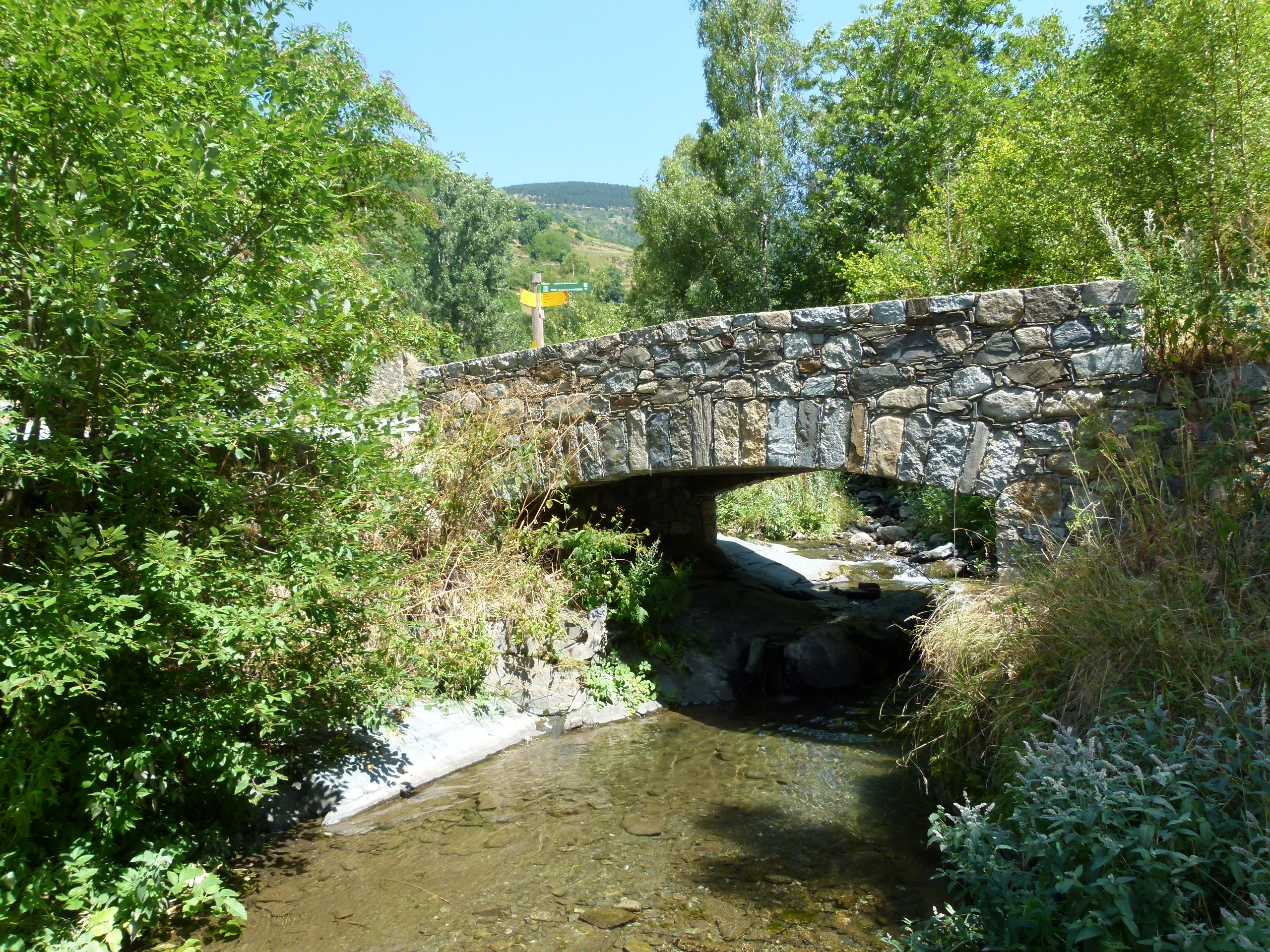 Pontet sobre el torrent de Vall-llobre (Setcases)